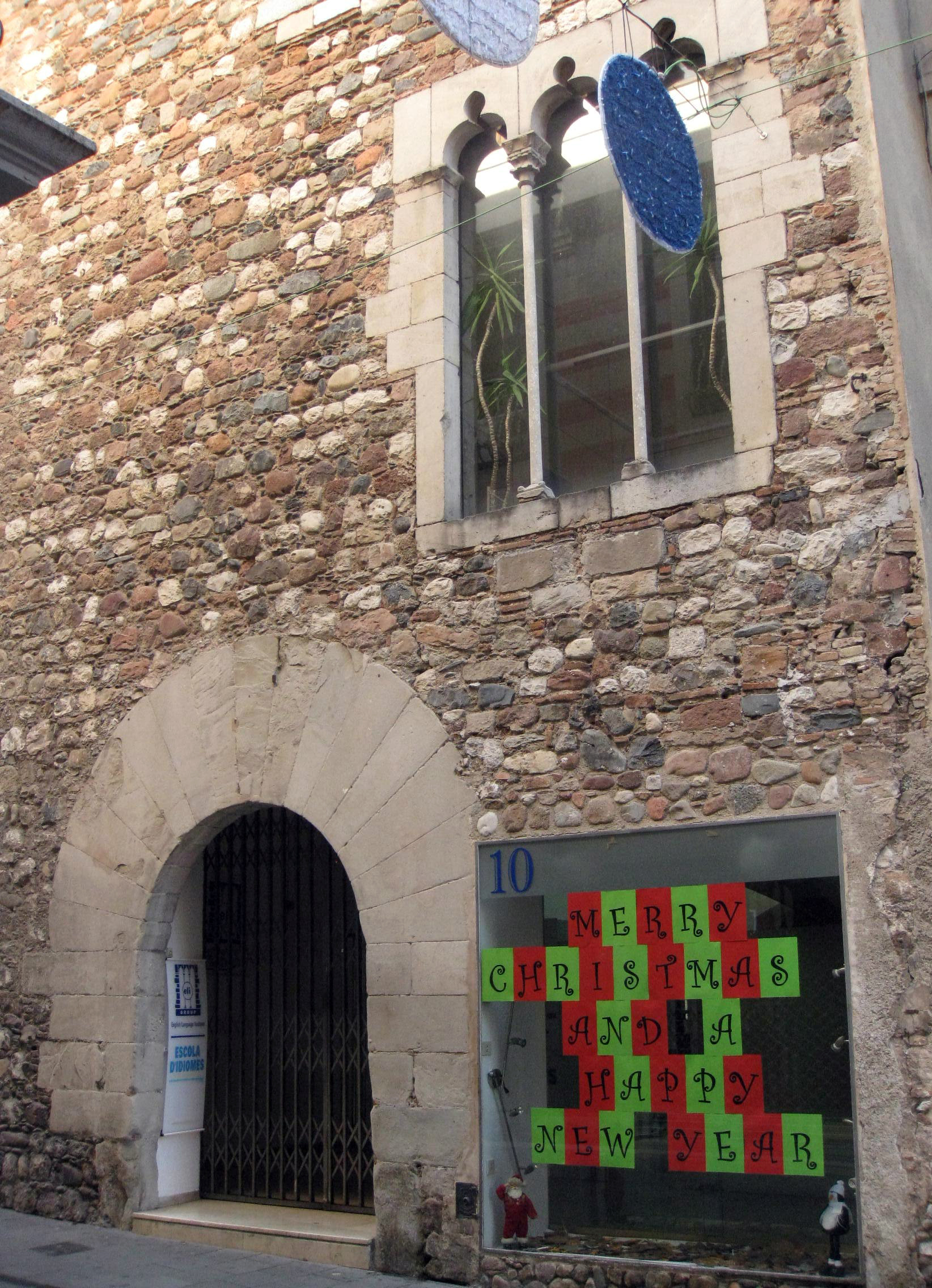 Casa dels Tagamanent (Granollers) Object location41° 36′ 29.91″ N, 2° 17′ 18.86″ E